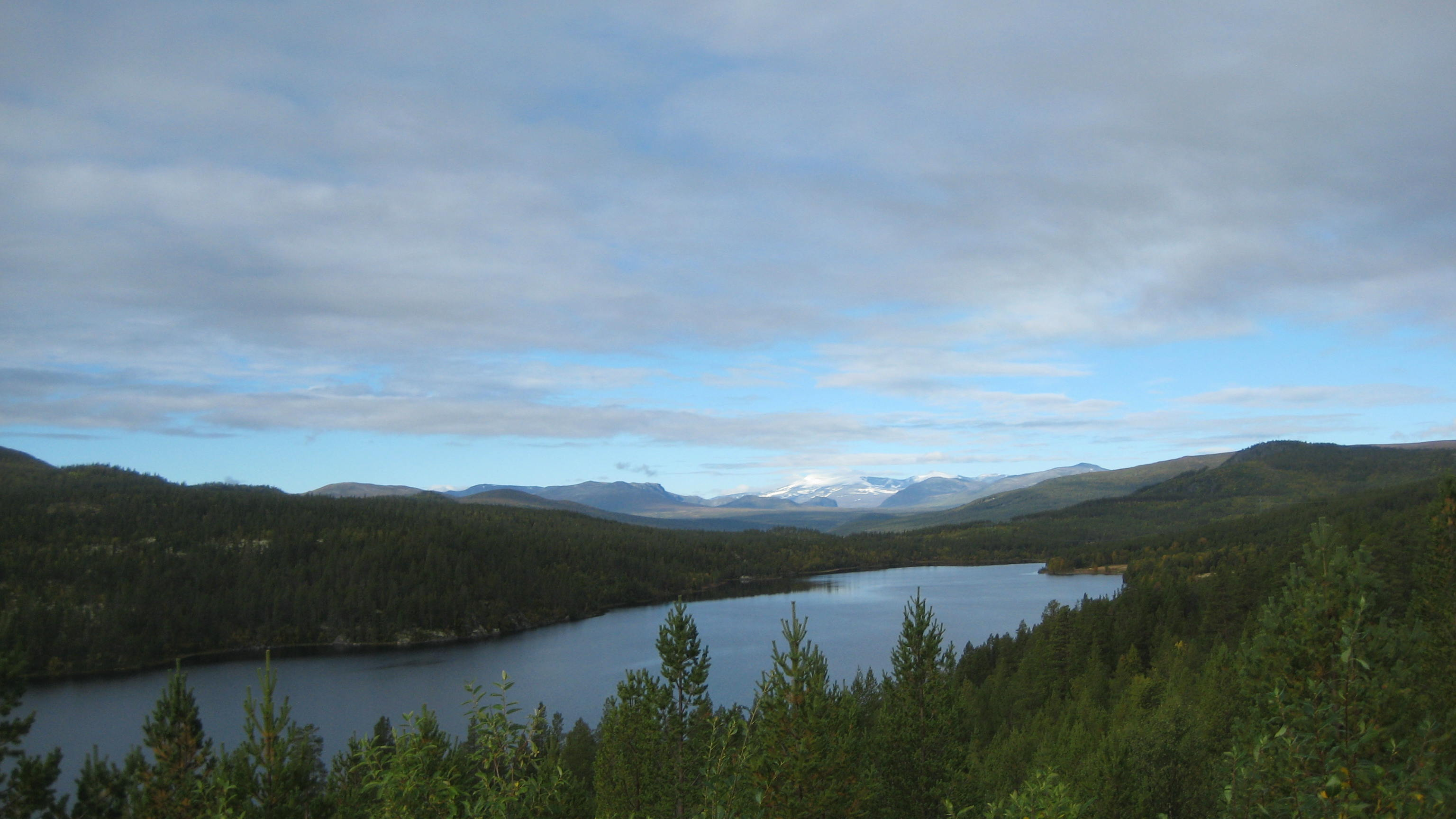 Breidsjøen. I bakgrunnen sees Jotunheimen